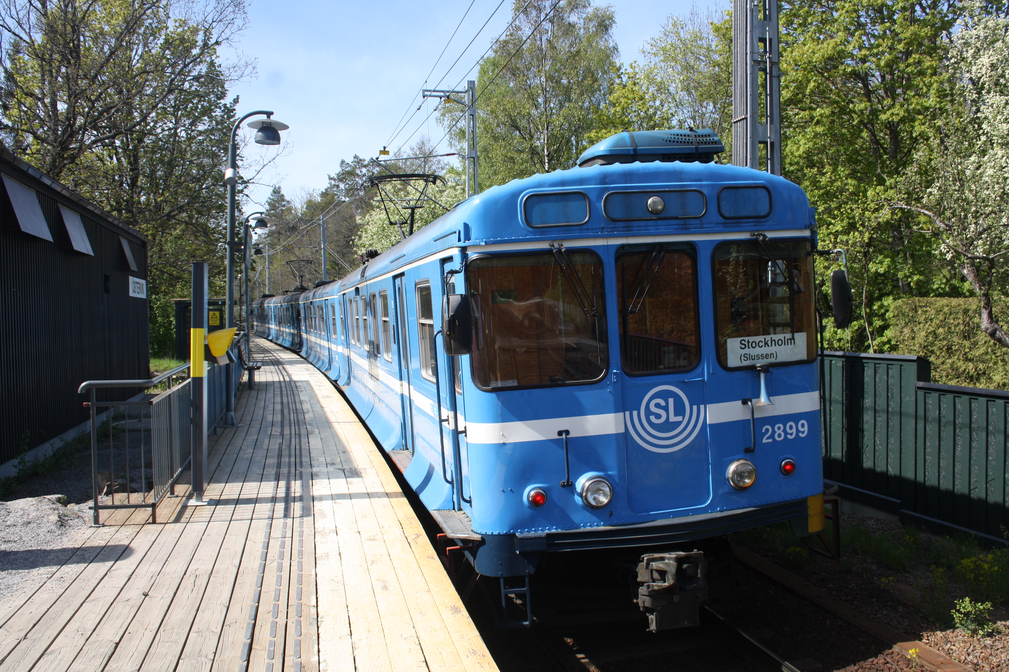 Östervik